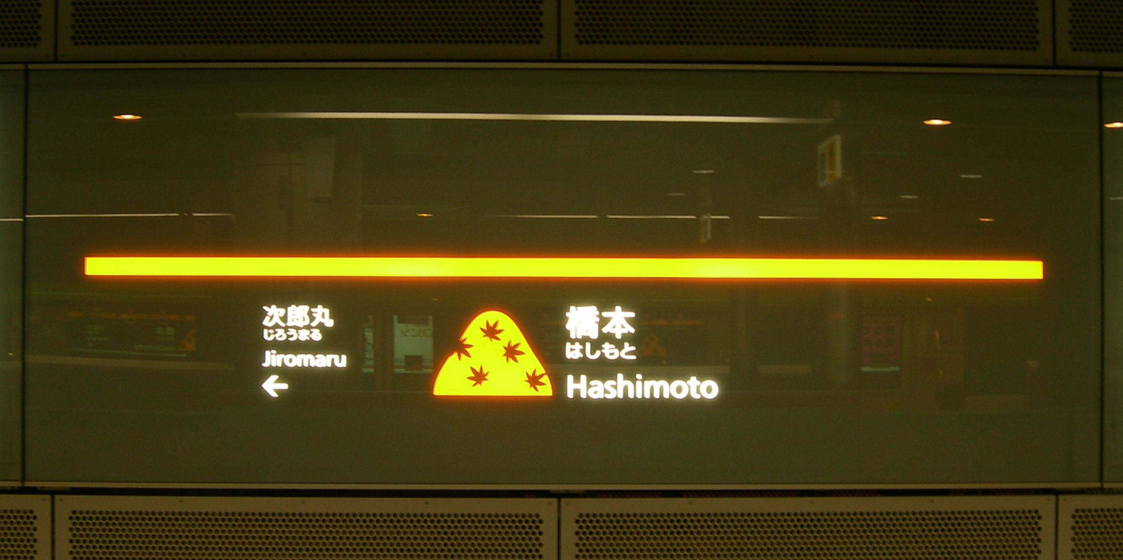 福岡市地下鉄七隈線橋本駅の駅名標